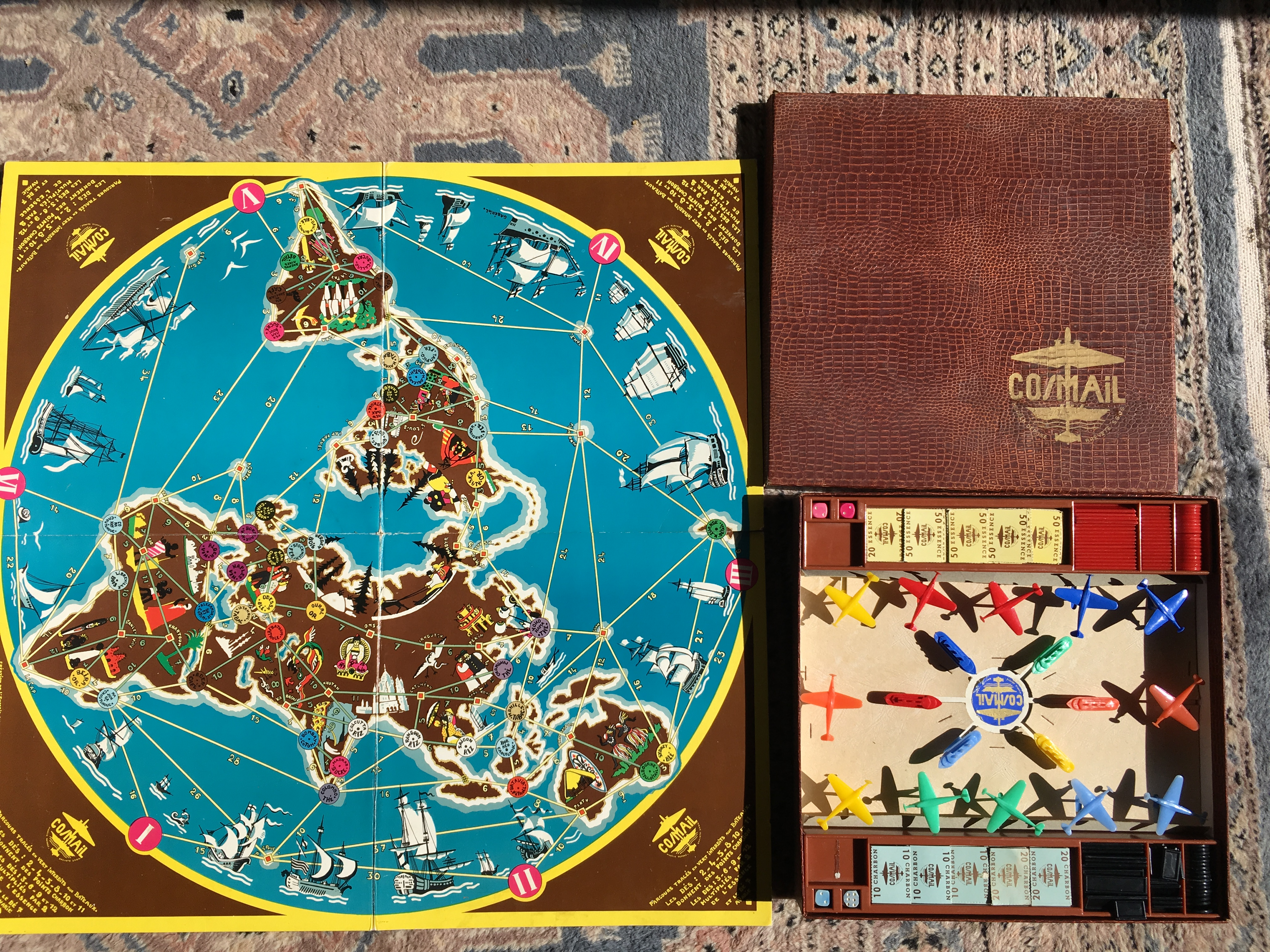 Plateau du jeu dessiné par Gabriel Loire ainsi que la boite ouverte et les pièces du jeu